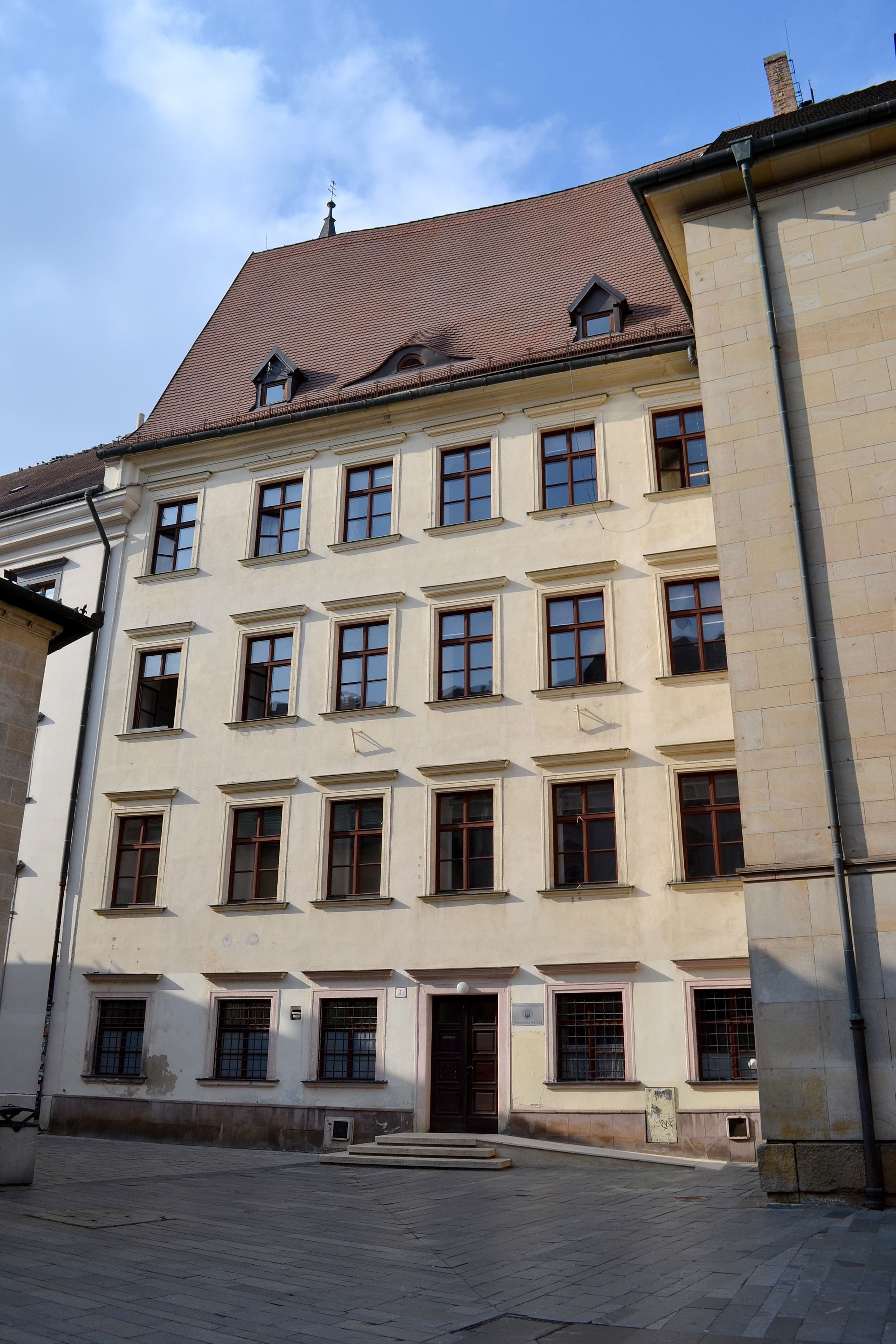 Kostolná ul. č. 1. Jezuitské kolégium a sídlo Teologickej fakulty Trnavskej univerzity Template:Cultural Heritage Slovakia101-90/0